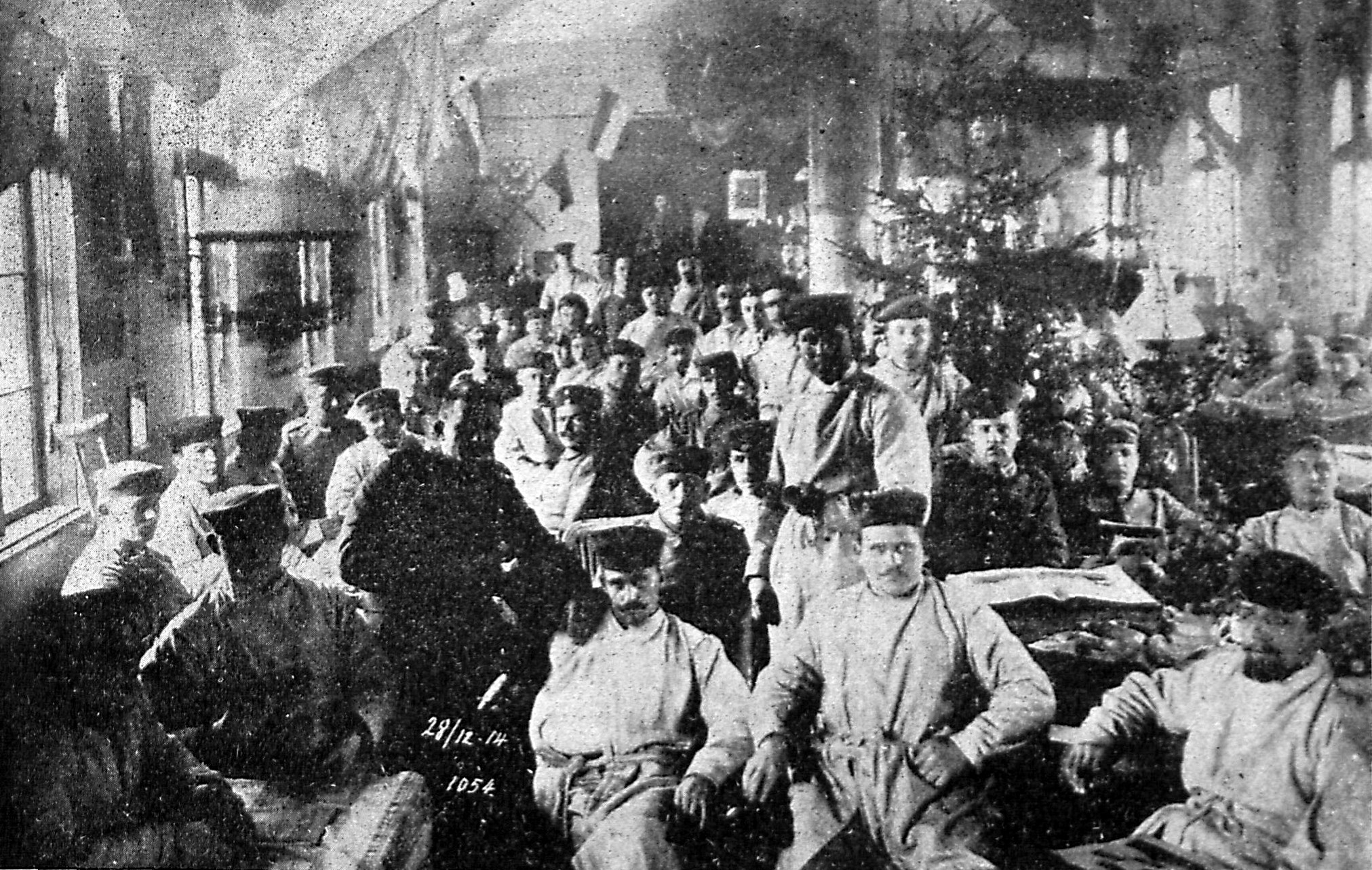 Der gemeinsame Tagesraum der Rekonvaleszenten.